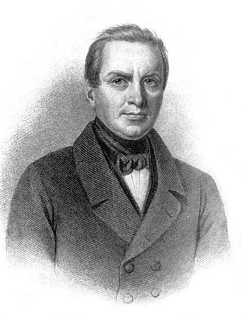 Иван Петрович Мятлев (1796—1844), поэт